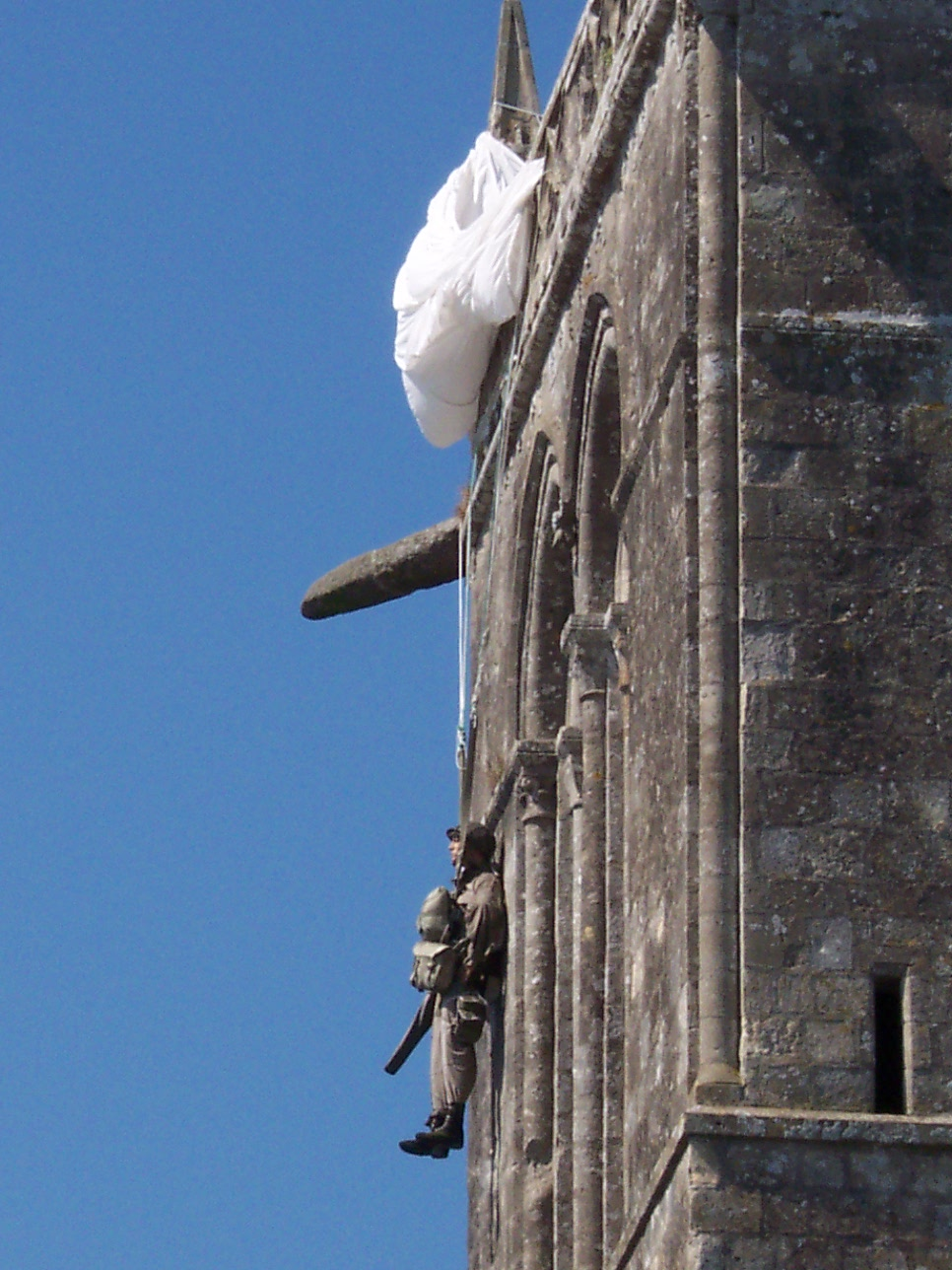 Parachute Memorial in Sainte-Mère-Église.